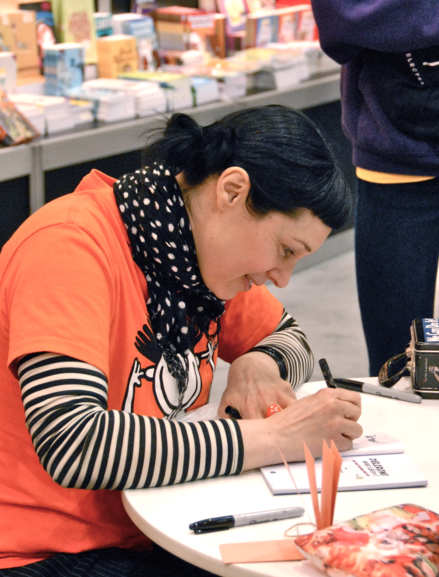 Annie Groovie, lors du Salon international du livre de Québec 2012